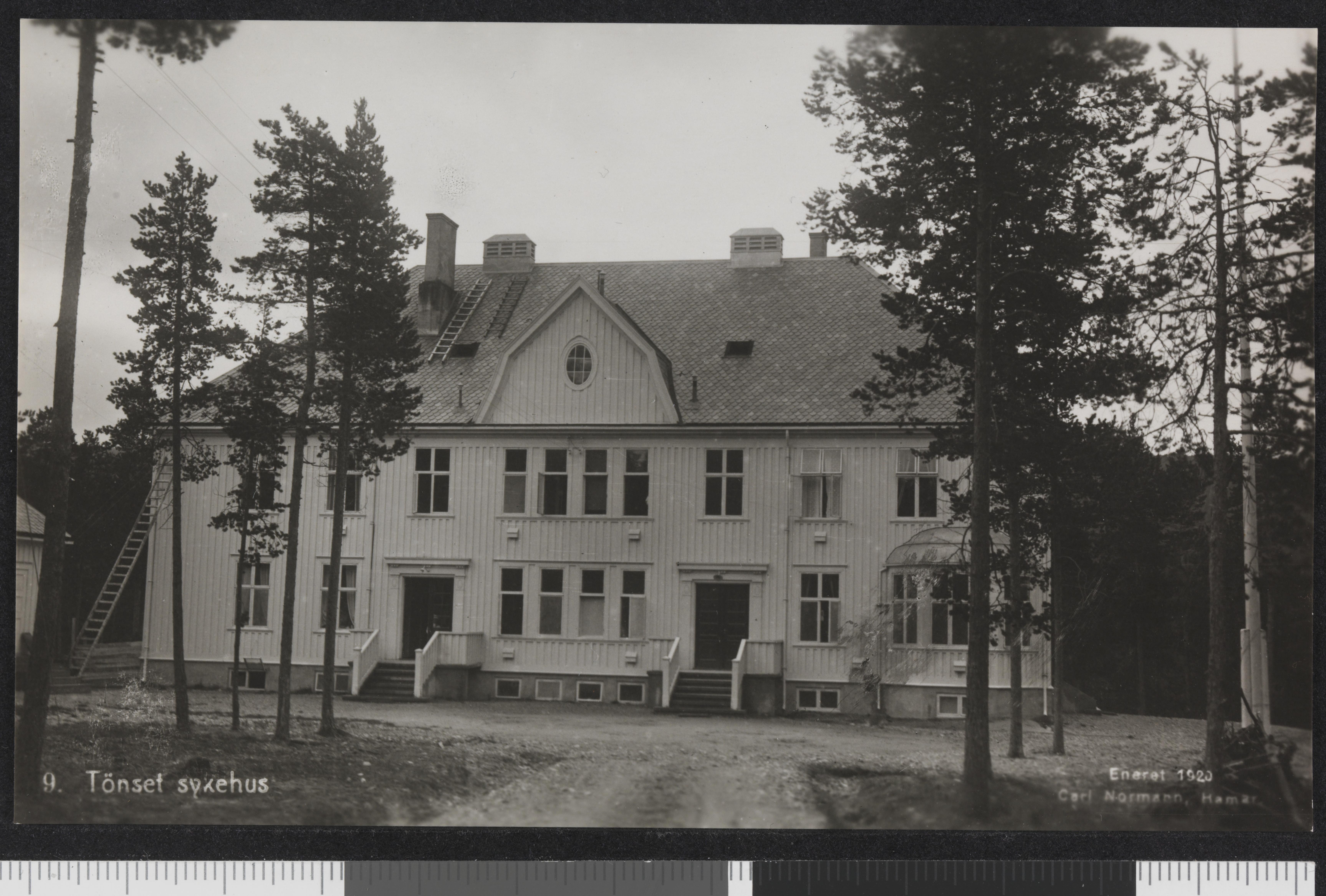 Bildet er hentet fra Nasjonalbibliotekets bildesamling Tynset, Hedmark